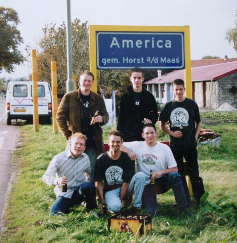 Rowwen-Hèze-fans voor het plaatsnaambord America op weg naar het slotconcert